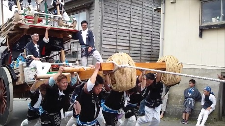 瀬波横町の坂での木遣り（新田町おしゃぎり）